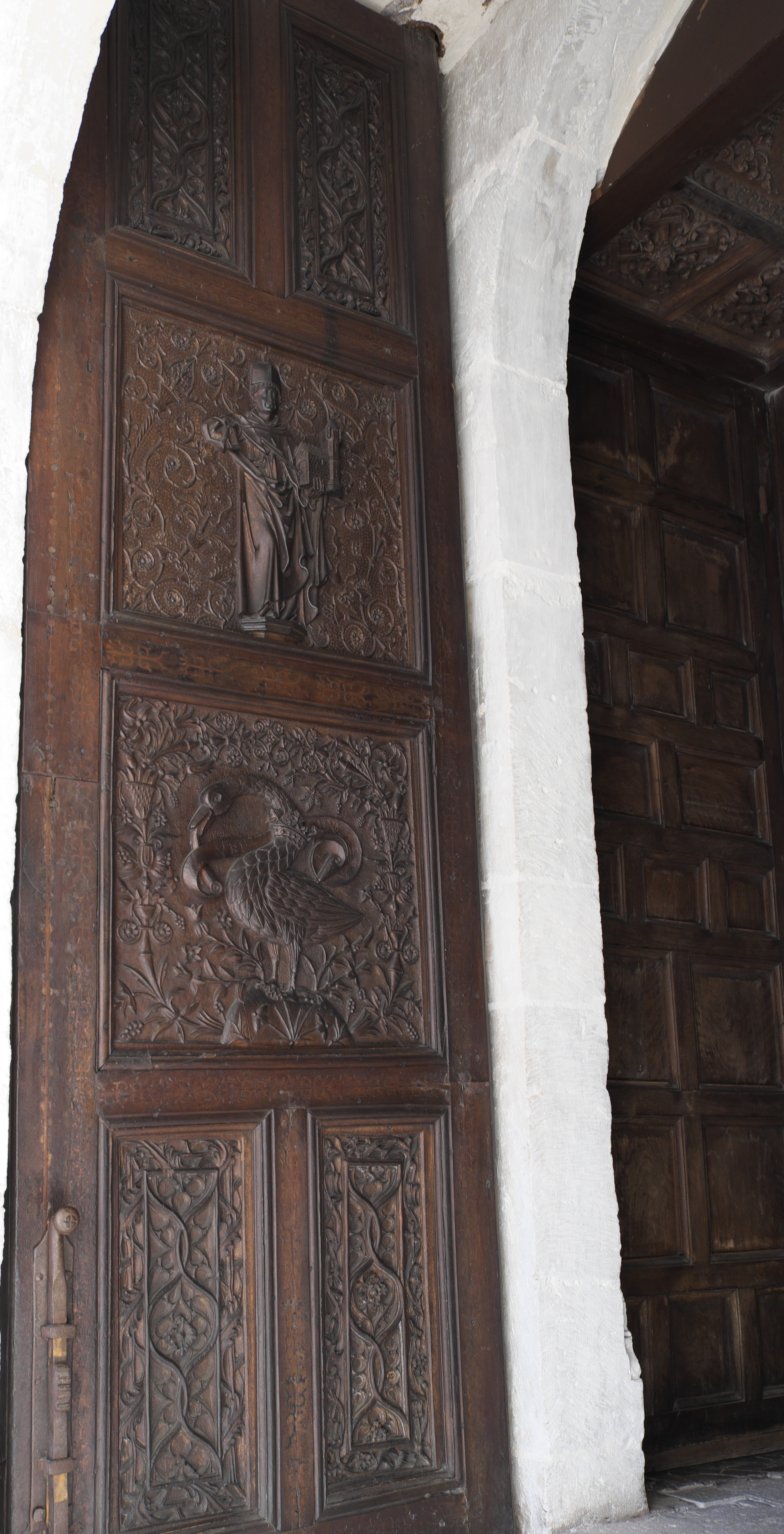 Biblioteca Santa Cruz des ehemaligen Colegio Mayor de Santa Cruz im Palacio de Santa Cruz in Valladolid (Kastilien und León/Spanien), geschnitzte Holztür am Eingang